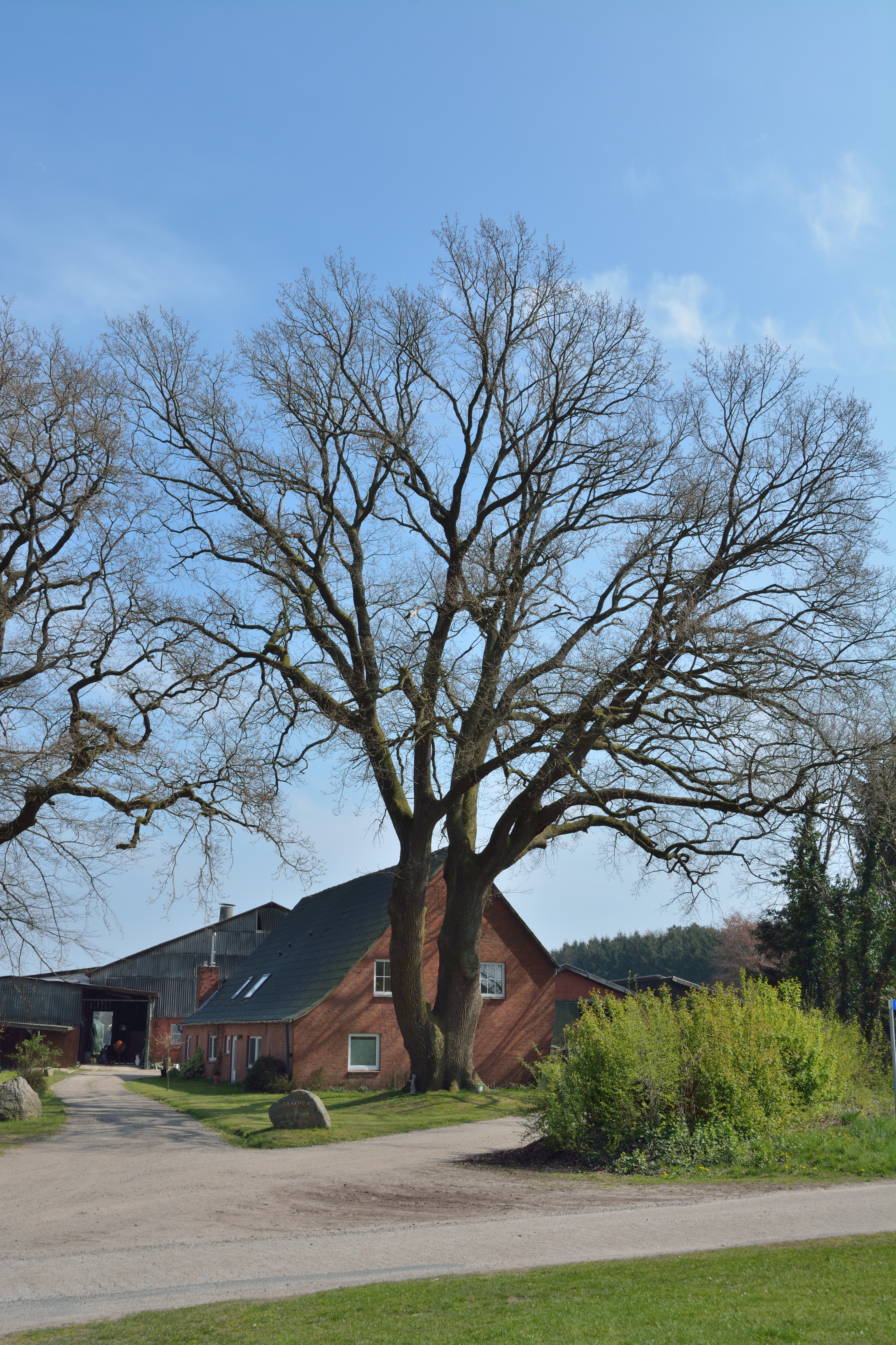 Eine Eiche in Heeßel ist das Naturdenkmal ND CUX 024 in Niedersachsen